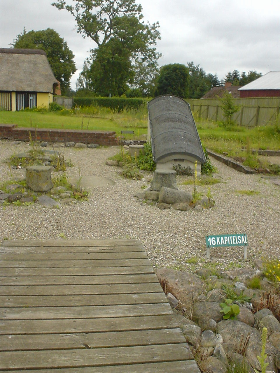 Kloster Oem, Jütland, Fundamente des Kapitelsaals